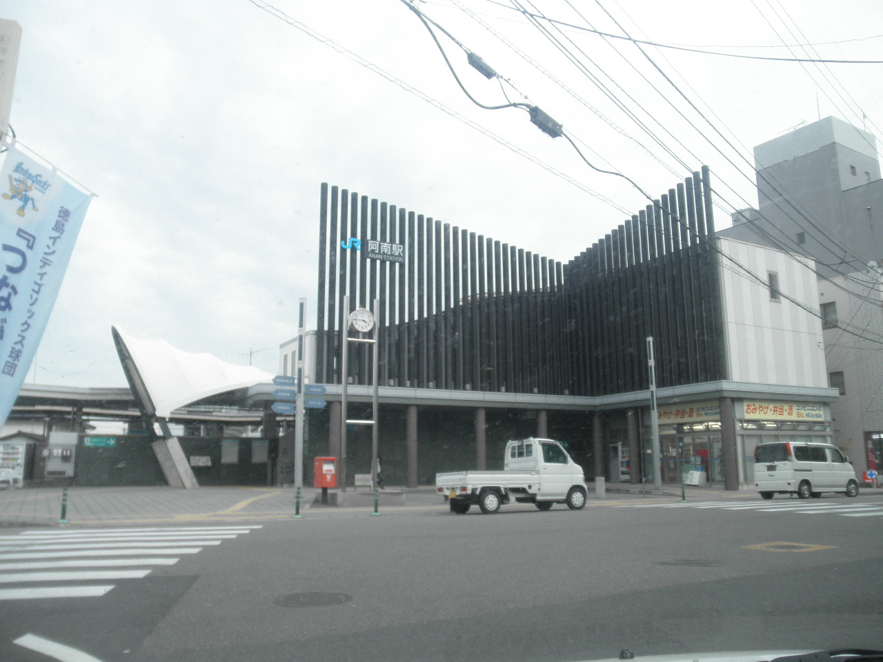 阿南駅 駅舎